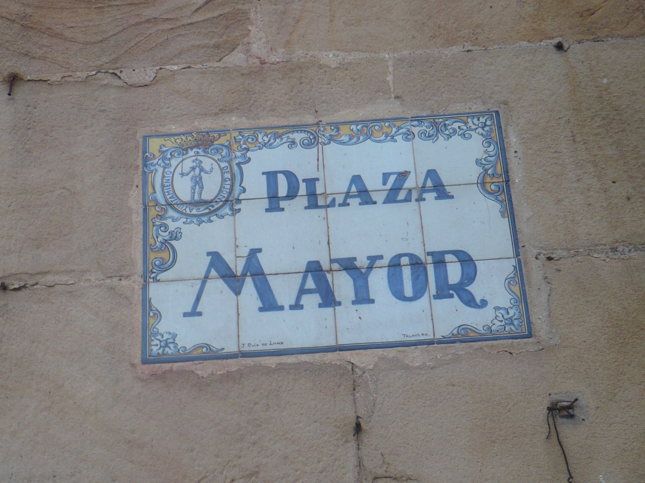 Lletreru de la Plaza Mayor col antiguu escudu de la ciudá enrriba a la chusca.